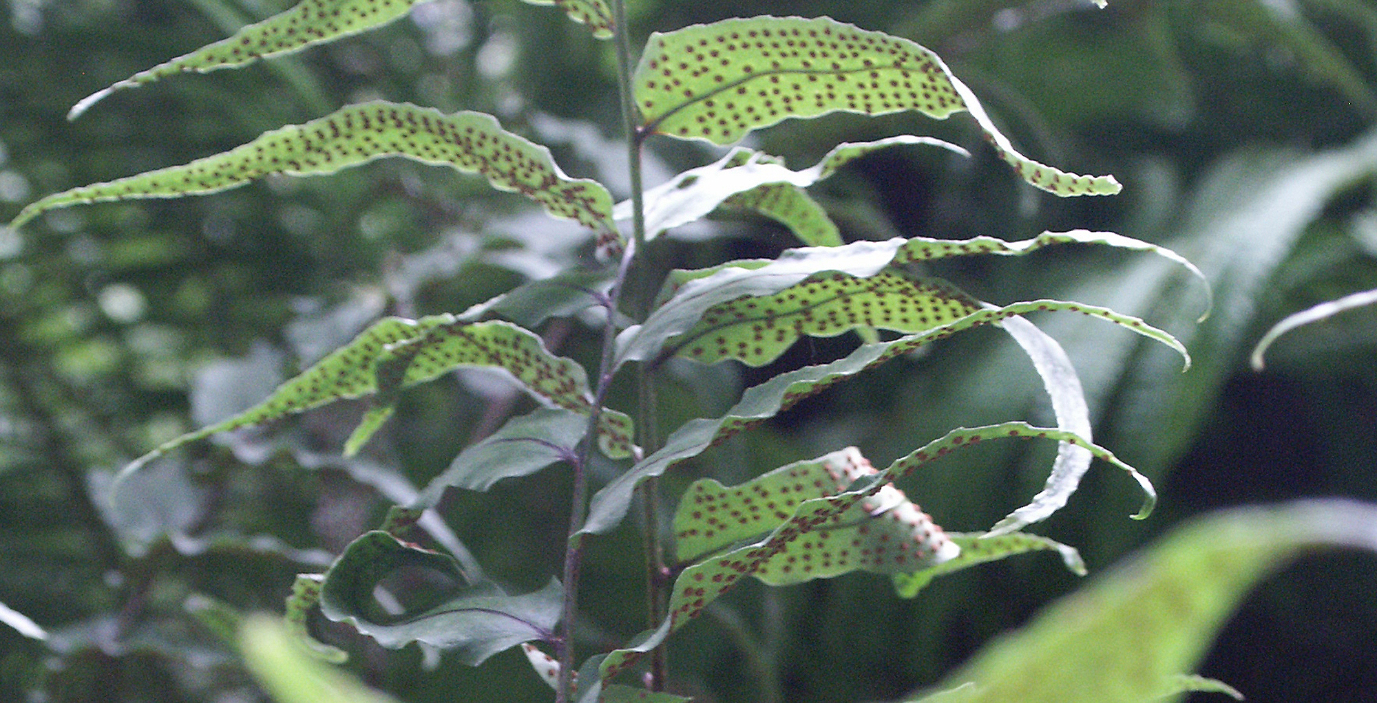 Fronde avec sores de Cyrtomium fortunei - Jardin botanique de Strasbourg